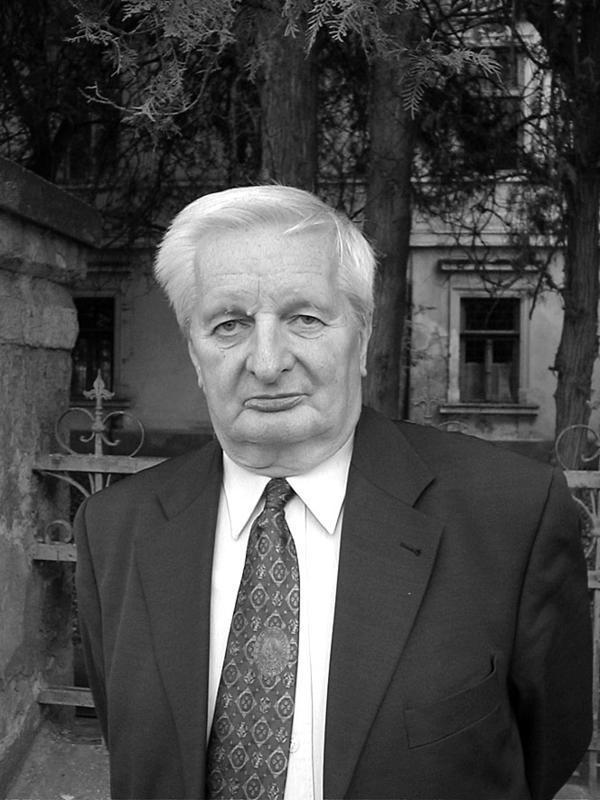 Pomogáts Béla (Budapest, 1934. október 22. –) Széchenyi-díjas magyar kritikus, tanár, irodalomtörténész, az irodalomtudományok doktora.